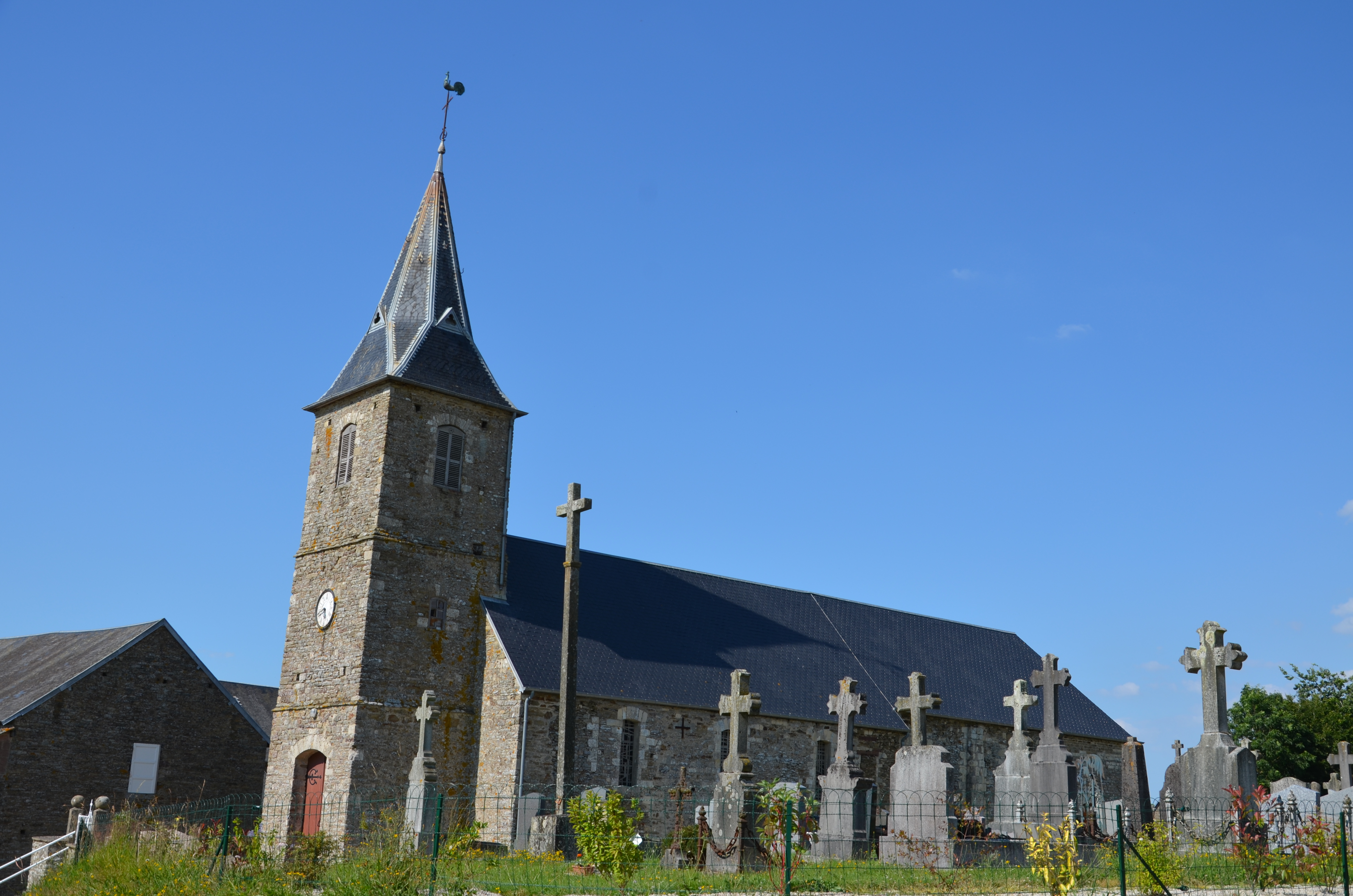 Église Saint-Martin de Les Loges.